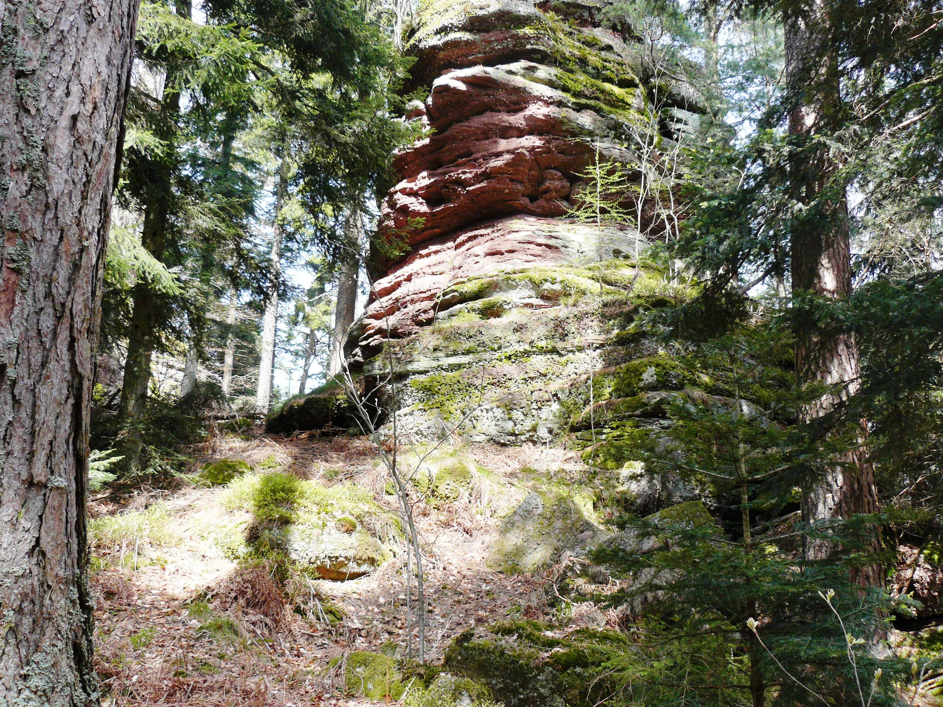 Rocher de la Ronde ds Roches (Altitude: 769 mètres) à Breitenau, Bas-Rhin Fr.